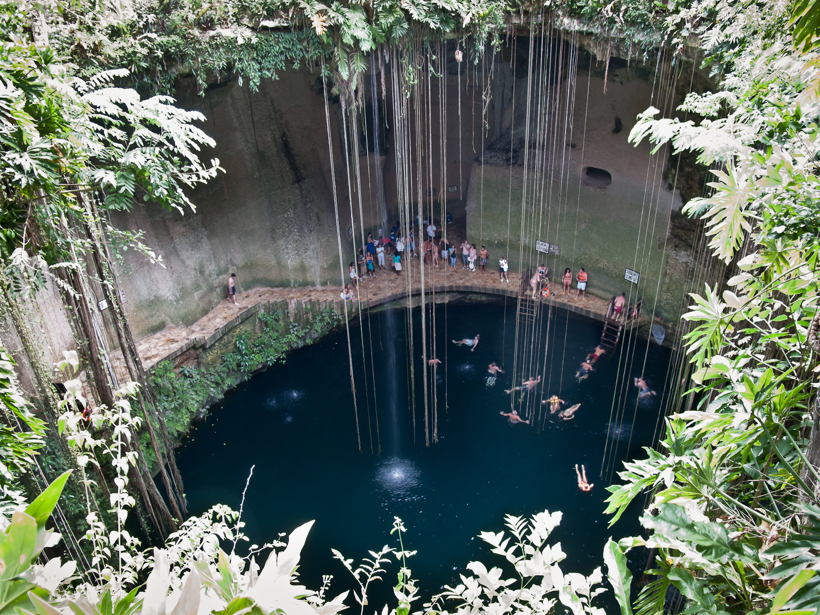 The Ik Kil cenote, close to Chichén Itzá, México